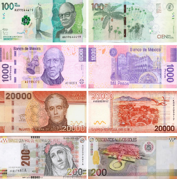 Monedas de los estados miembros de la Alianza del Pacífico